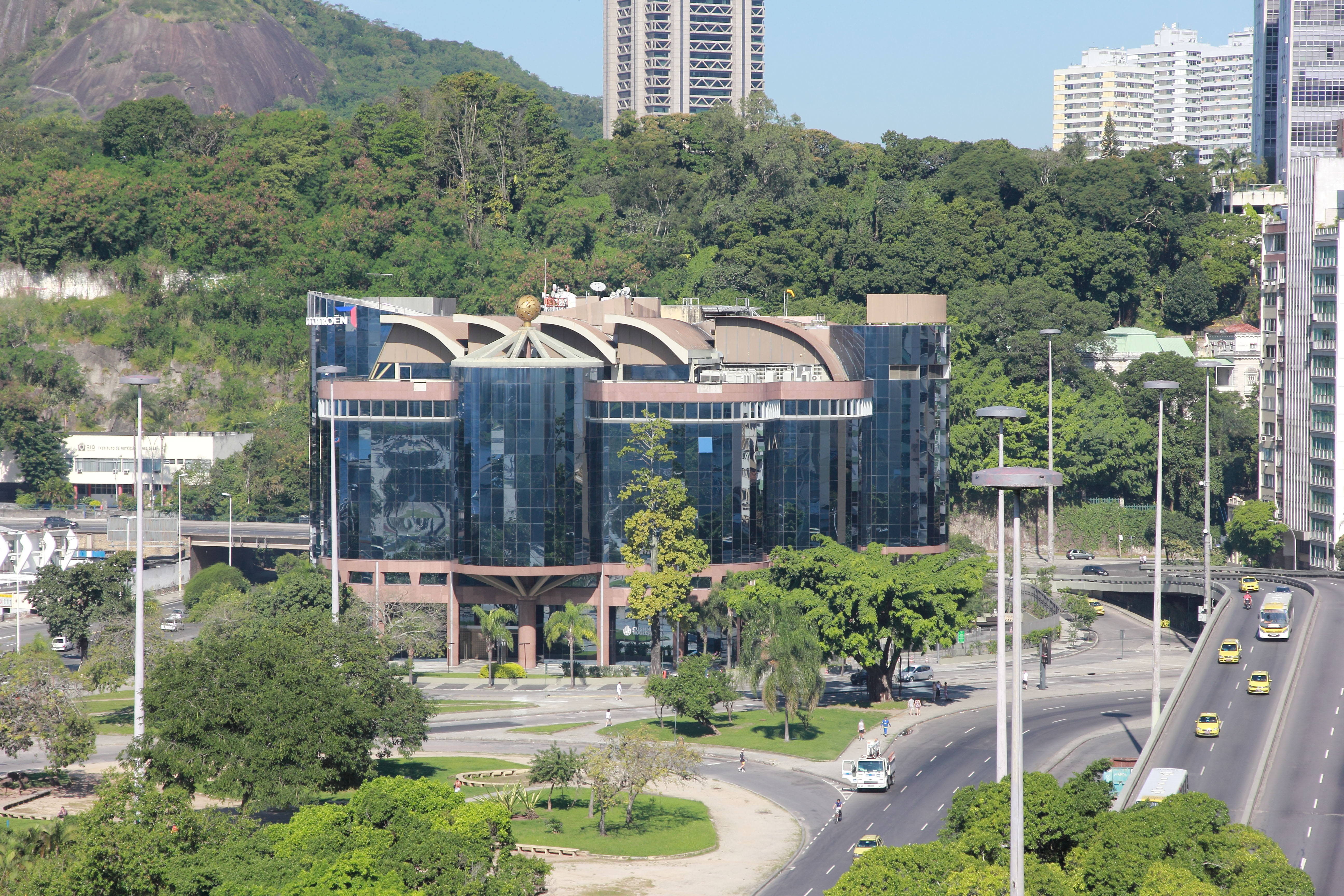 Vista do Botafogo Praia Shopping - Centro Empresarial Mourisco.